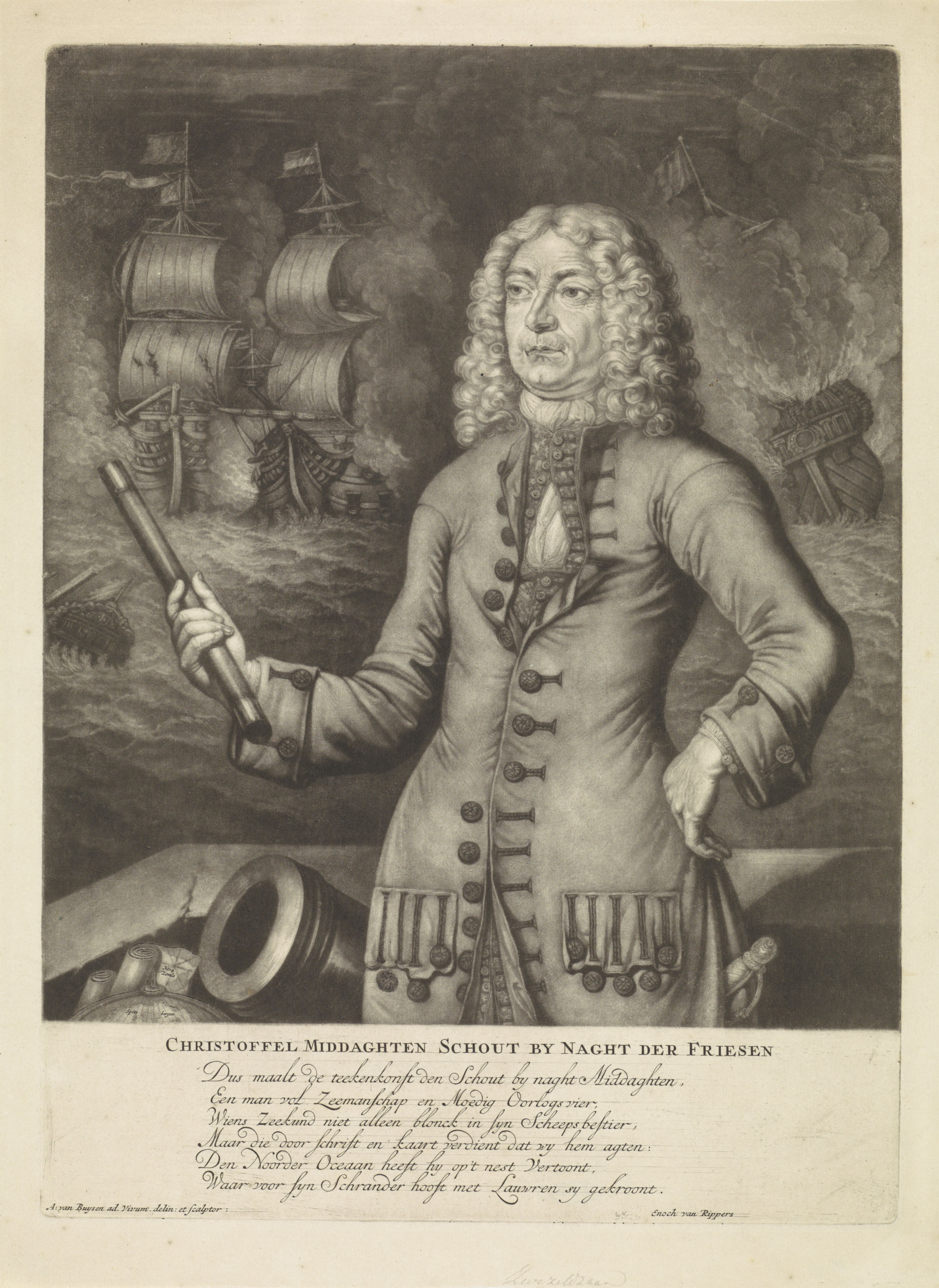 IdentificatieTitel(s): Portret van Christoffel MiddaghtenObjecttype: prent Objectnummer: RP-P-1891-A-16615Catalogusreferentie: Wurzbach 6-2(2)Van Someren 3678Opschriften / Merken: verzamelaarsmerk, verso, gestempeld: Lugt 2228Omschrijving: Portret van Christoffel Middaghten, schout-bij-nacht van de Friese Admiraliteit en cartograaf. Op de achtergrond een zeeslag.VervaardigingVervaardiger: prentmaker: Andries van Buysen (Sr.) (vermeld op object)schrijver: Enoch van Rippers (vermeld op object)Plaats vervaardiging: AmsterdamDatering: 1698 - 1747Fysieke kenmerken: mezzotint en gravureMateriaal: papier Techniek: mezzotint / graveren (drukprocedé)Afmetingen: plaatrand: h 420 mm × b 306 mmOnderwerpWat: nightbattle (+ sailing-ships)Wie: Christoffel MiddaghtenVerwerving en rechtenVerwerving: aankoop nov-1891Copyright: Publiek domein